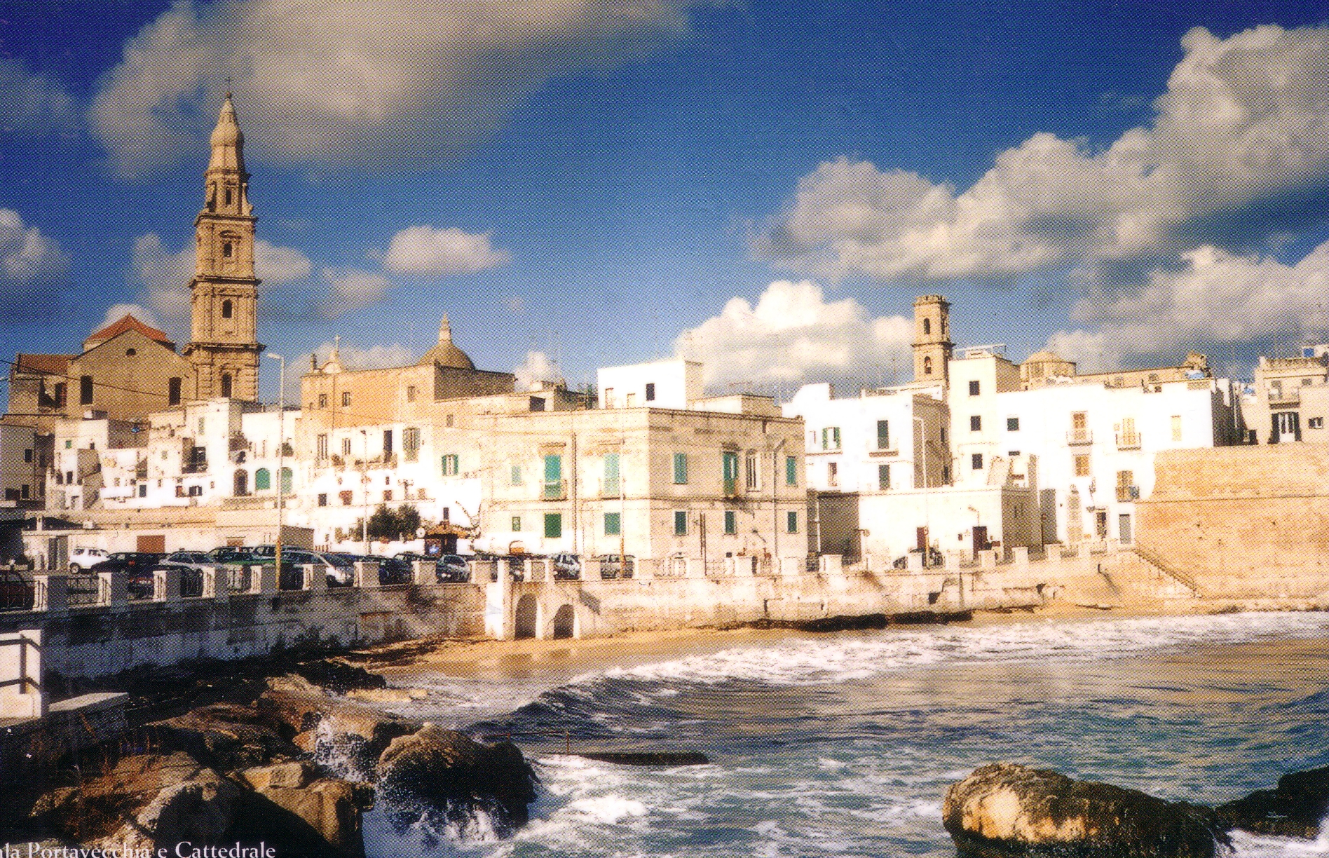 Monopoli, seen from the sea